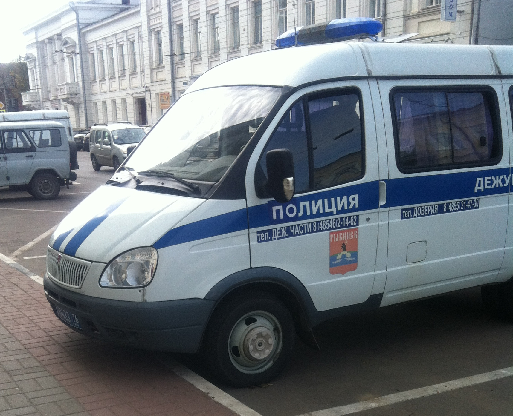 Пример заклейки первых двух букв слова «Милиция» (Ярославская область)